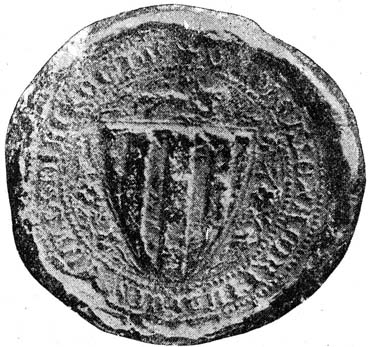 Köcski Sándor országbíró pecsétje